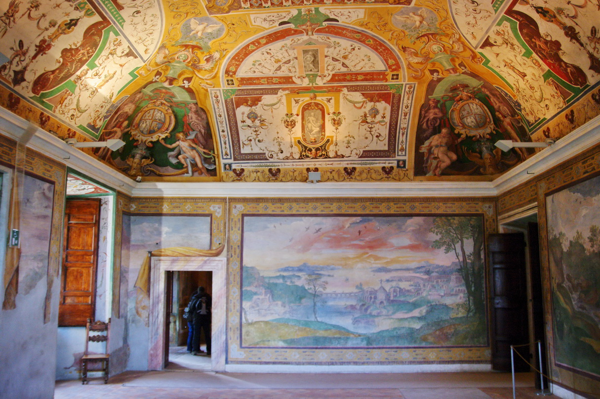 Innenraum Villa d'ESTE, Tivoli